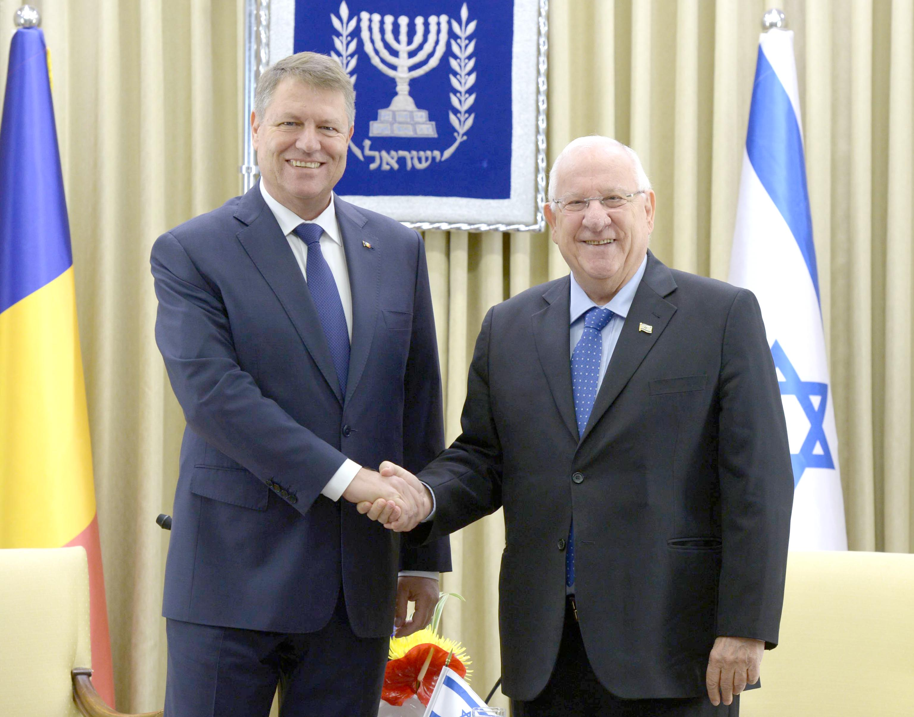 ביקור נשיא רומניה קלאוס יוהאניס במשכן נשיא מדינת ישראל ראובן ריבלין